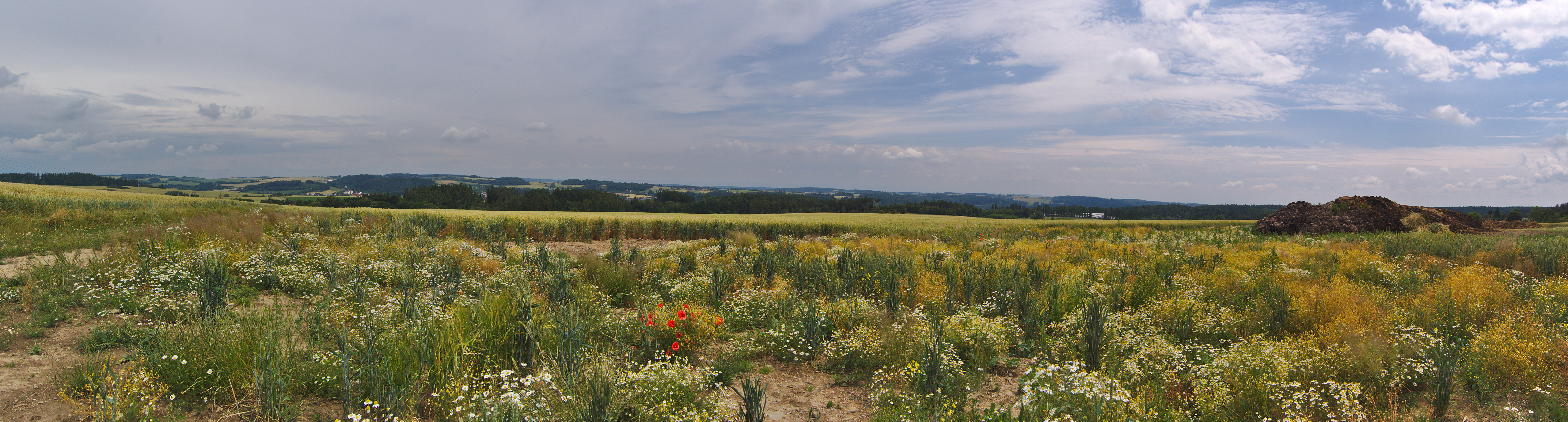 Výhled na Runářov, Konici a okolí od západu, okres Prostějov